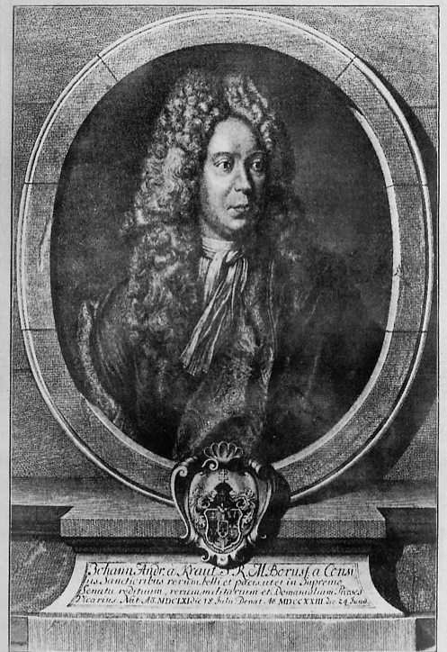 Johann Andreas Kraut (1661–1723). Stich von Johann Georg Wolfgang